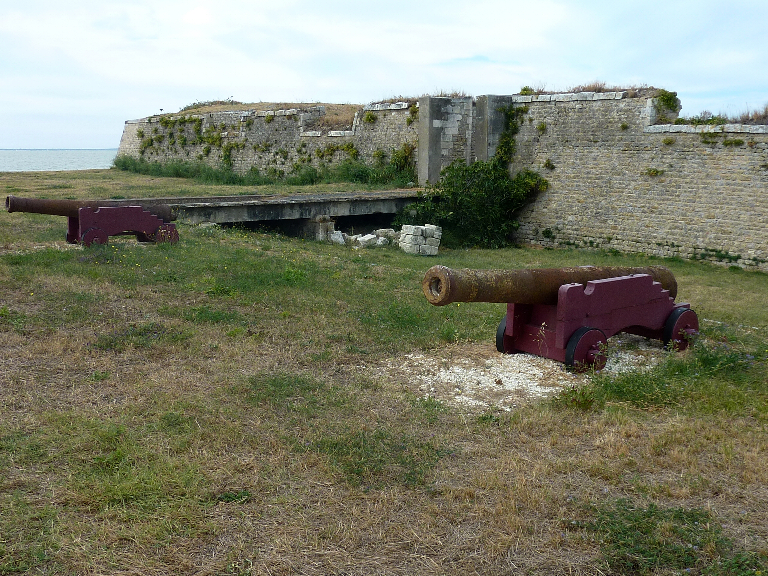 Fort l'Eguille (ou Fort de l'Aiguille) Fouras Charente Maritime France